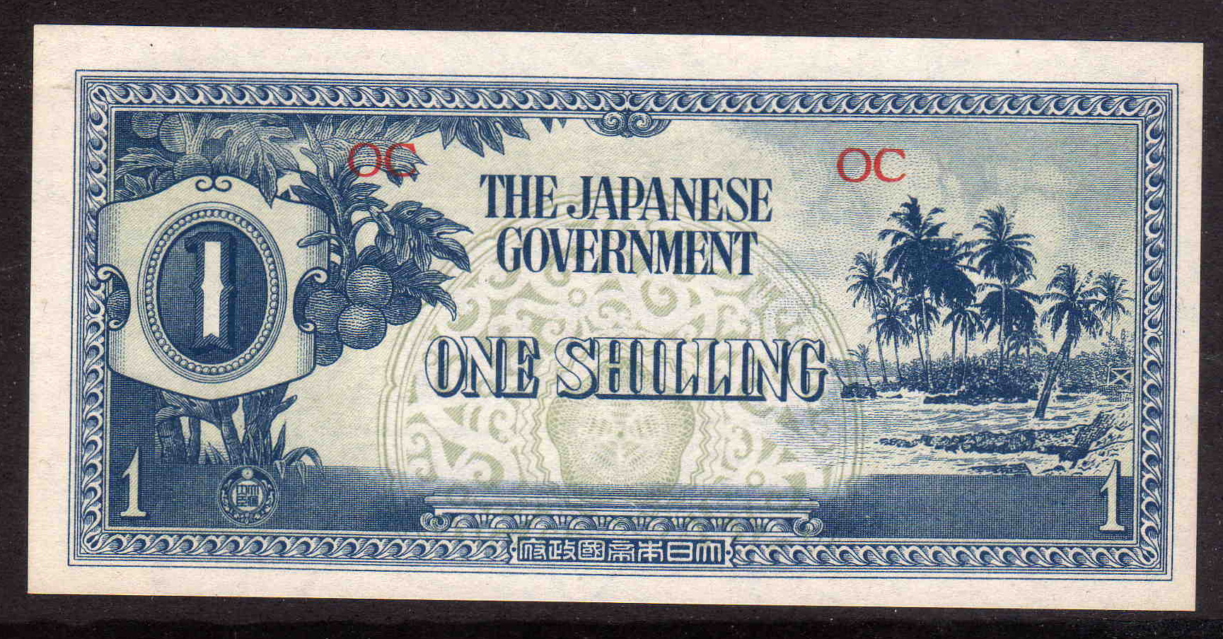 日本軍が第二次世界大戦中に太平洋地域で使用した1シリング軍票。通貨単位はオーストラリア・ポンドである